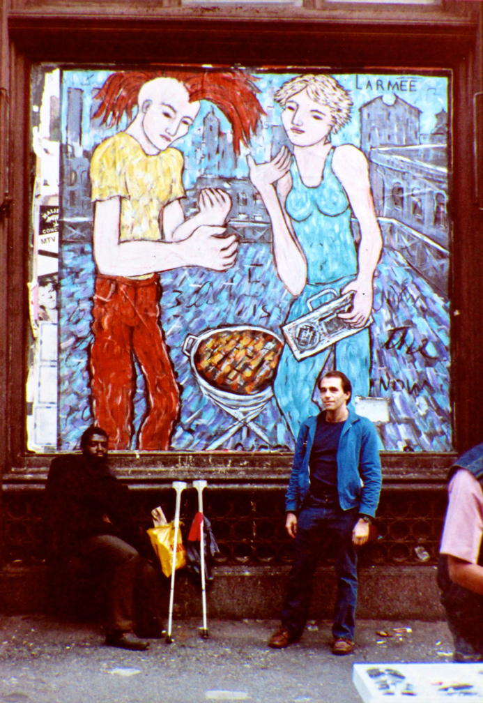 Cette peinture de rue a été collé à un mur sur Mercer Street, entre Broome et Spring Street dans la zone de Soho de New York City vers 1985.